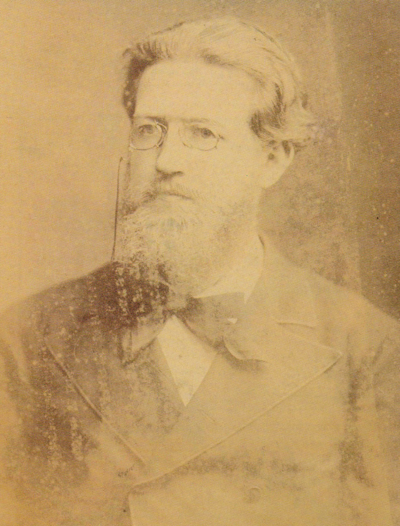 angeblich ein Porträt von Johann Georg Müller (1780-1842)